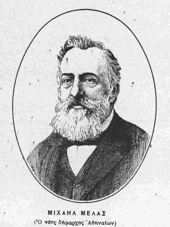 Griechischer Politiker, 19. Jahrhundert